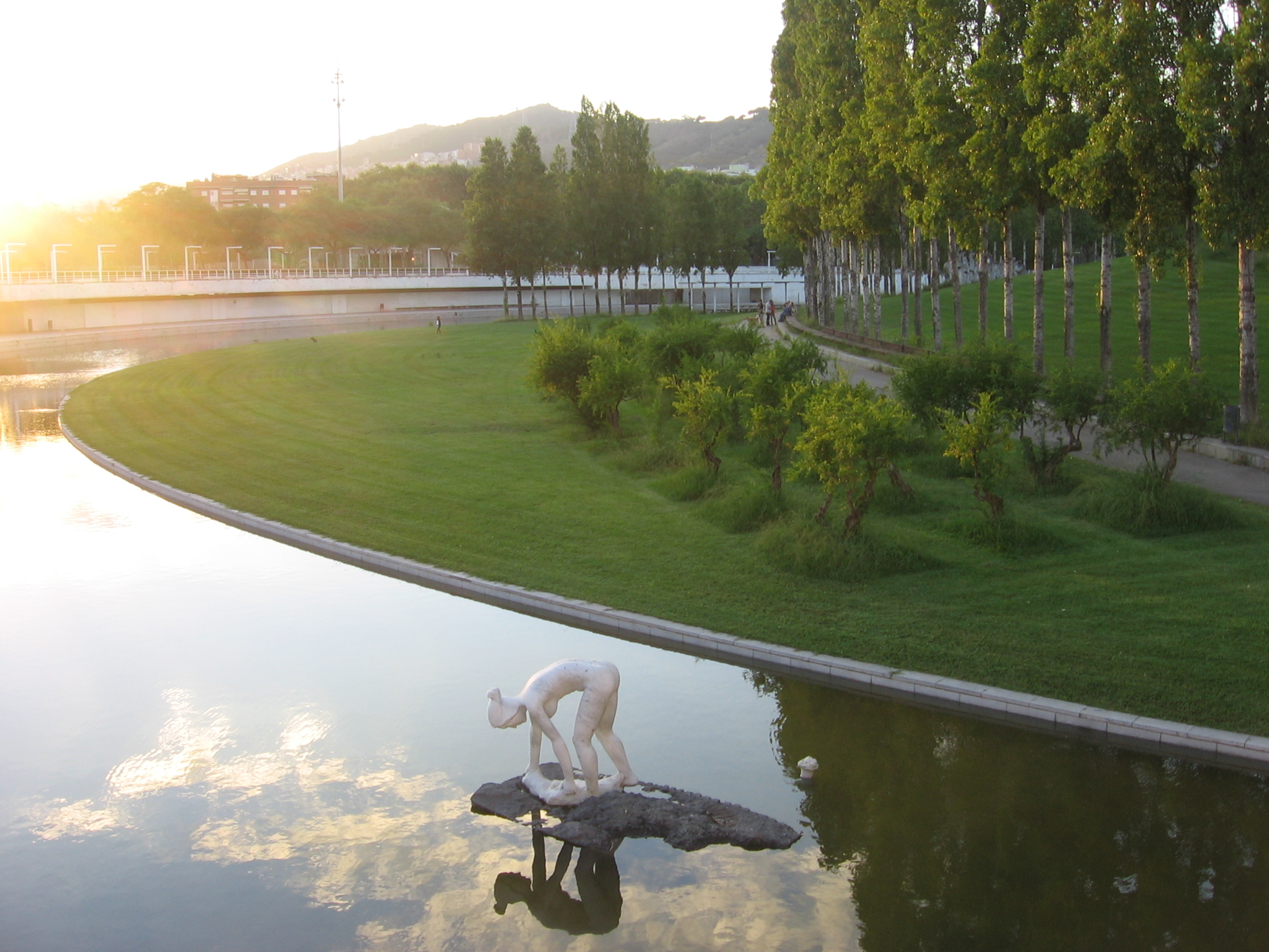 Parque de la Trinidad.